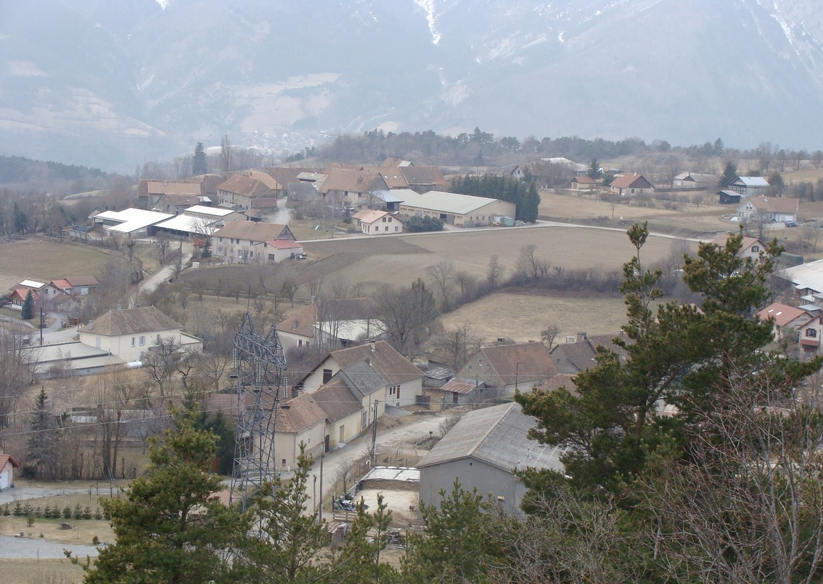 Les Costes (Hautes-Alpes): le bourg, vue d'ensemble.